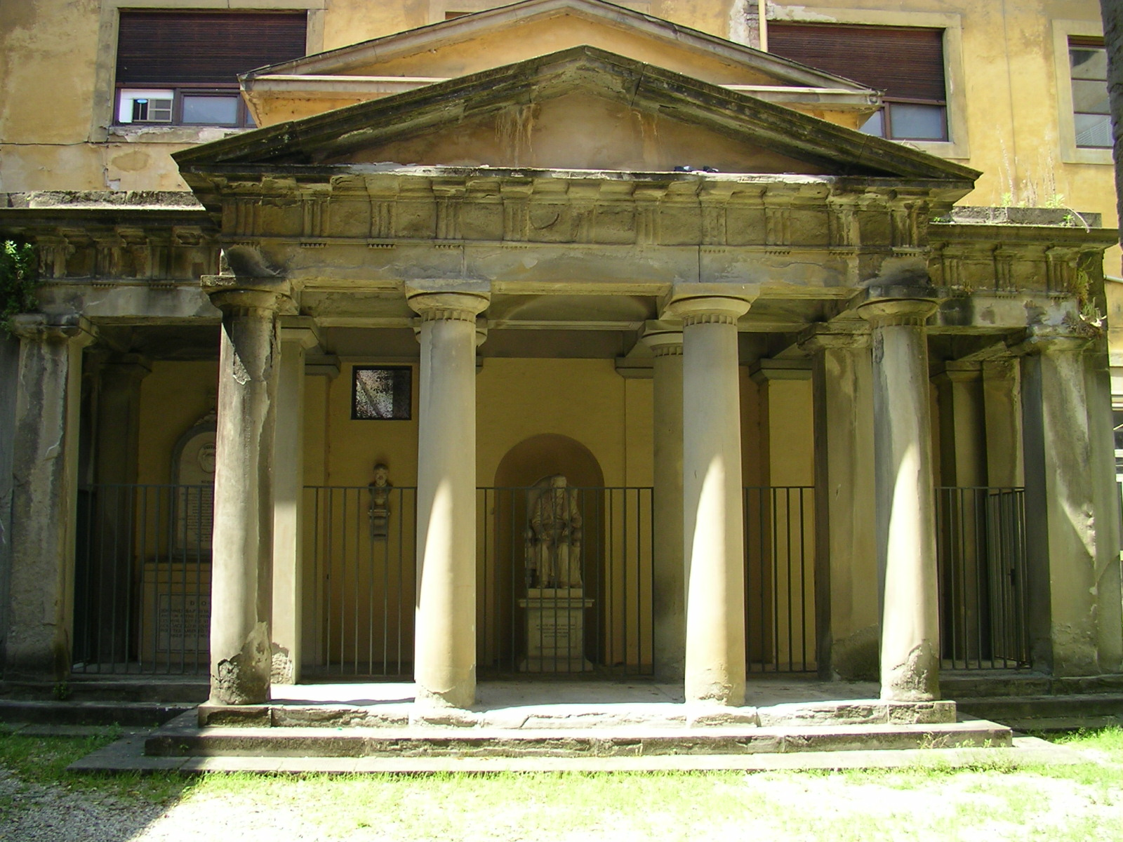 Chiostro delle Ossa from Ospedale di Santa Maria Nuova, front view in Florence, Italy